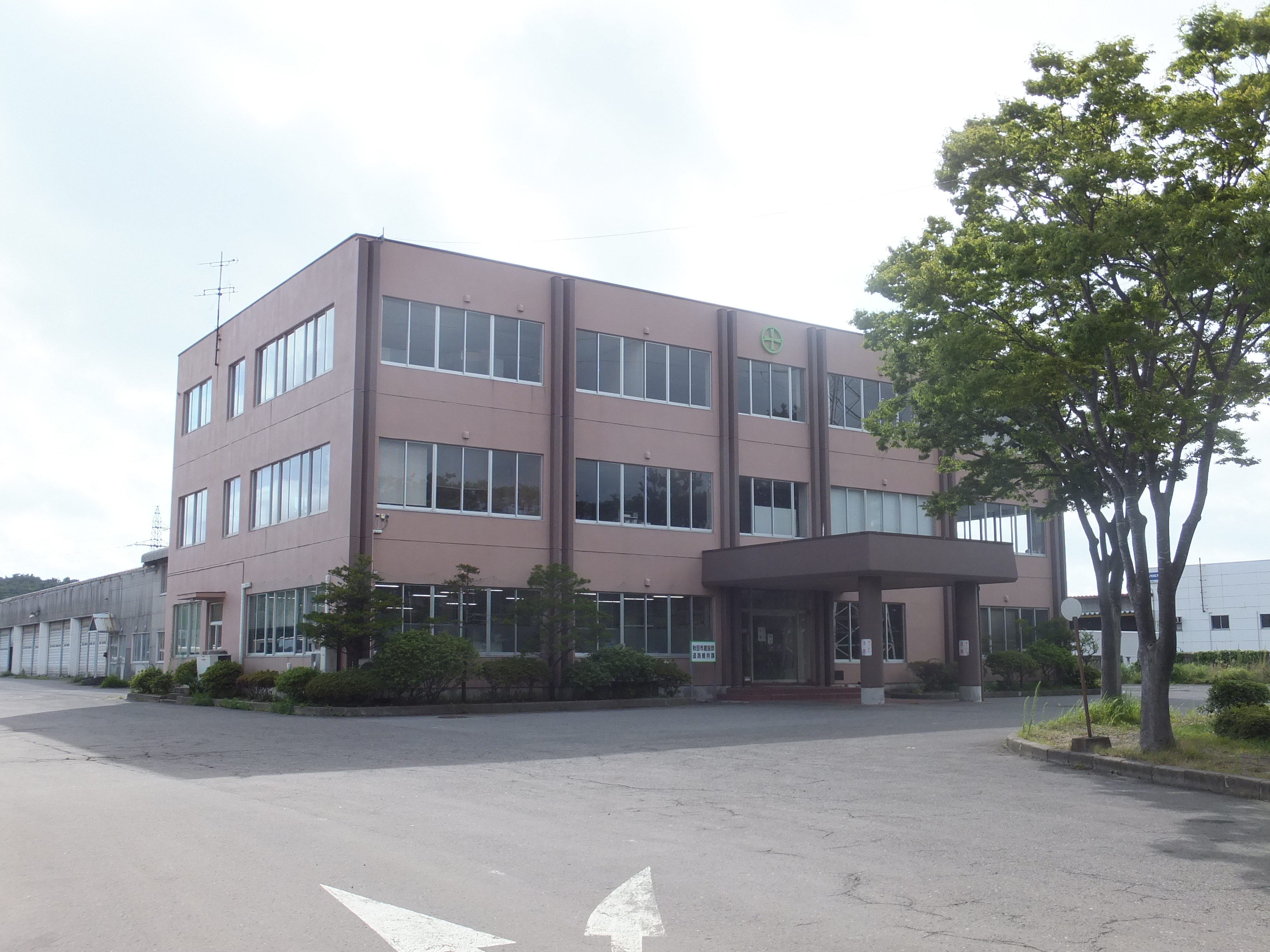 秋田市建設部道路維持課庁舎。かつての秋田市交通局の庁舎である。